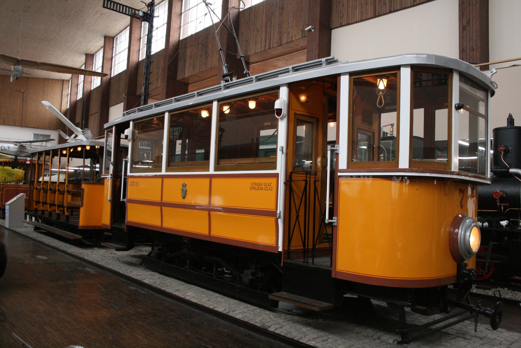 Dubrovački tramvaj, postav Tehničkog muzeja u Zagrebu